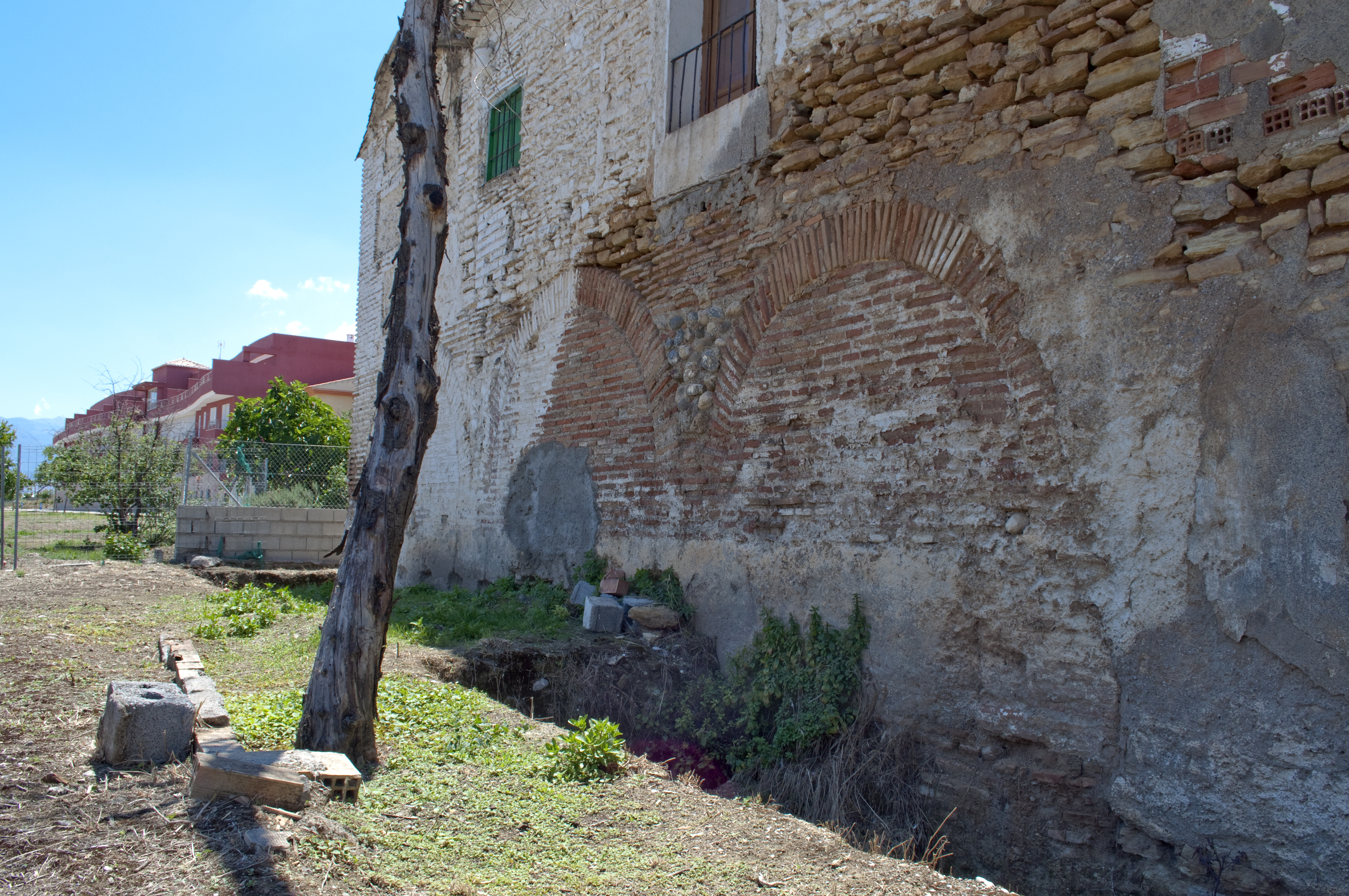 Baño Árabe